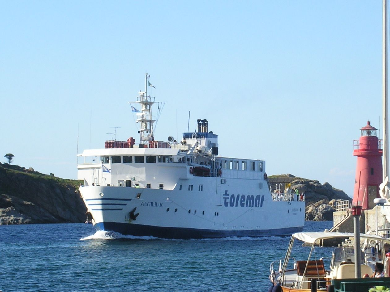 M/T Aegilium der Toremar in Giglio Porto